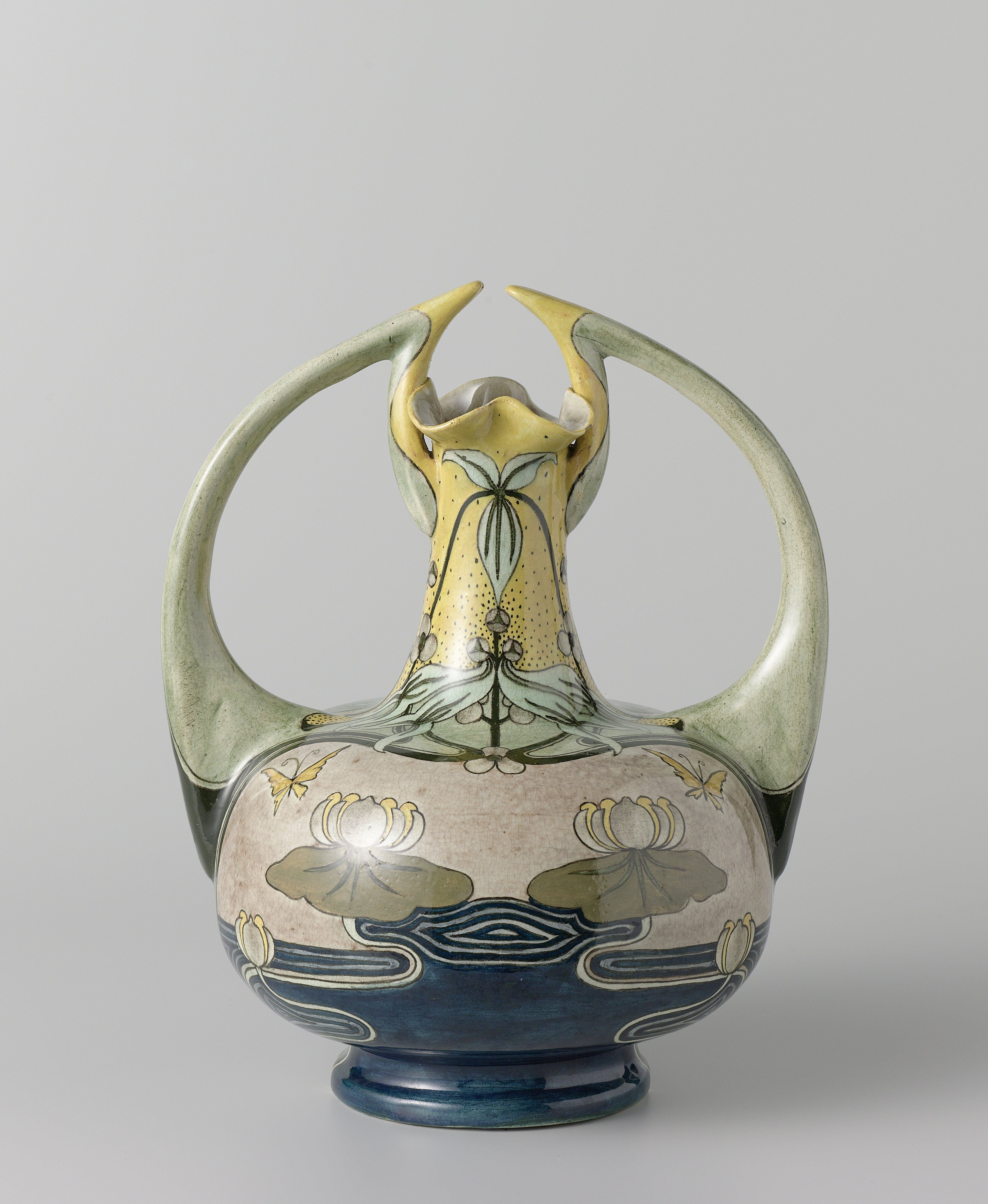 IdentificatieTitel(s): Vaas met pijlkruid, waterlelies en vlindersObjecttype: vaas Objectnummer: BK-1968-65Opschriften / Merken: merk, onderzijde vaas: ‘Klomp, monogram NB, Faience de Purmerende, Hollande; links 1011; rechts Dec: C, monogram, en D, alles in Bruin.’stempel, onderzijde vaas: ‘R.’Omschrijving: Vaas met twee oren, afgeplat bolvormig met cilindervormige hals met gelobde uitstaande mondrand. Polychrome beschildering van pijlkruid, waterlelies en vlinders op blauw (water) en lichtpaars fond. Schouders en oren groen, oren met geel uiteinde. Hals in geel met zwarte stippen. Binnenzijde vaas lichtpaars. Gemerkt, boven elkaar: klomp, monogram NB, Faience de Purmerende, Hollande; links 1011; rechts Dec: C, monogram, en D, alles in Bruin. Ingestempeld: R.VervaardigingVervaardiger: Firma Wed. N.S.A. Brantjes en Co.Plaats vervaardiging: PurmerendDatering: 1895 - 1904Materiaal: aardewerk Techniek: schildertechniekAfmetingen: h 26 cm. × b 21,0 cm. × d 17,8 cm. Verwerving en rechtenVerwerving: aankoop 1968Copyright: Publiek domein